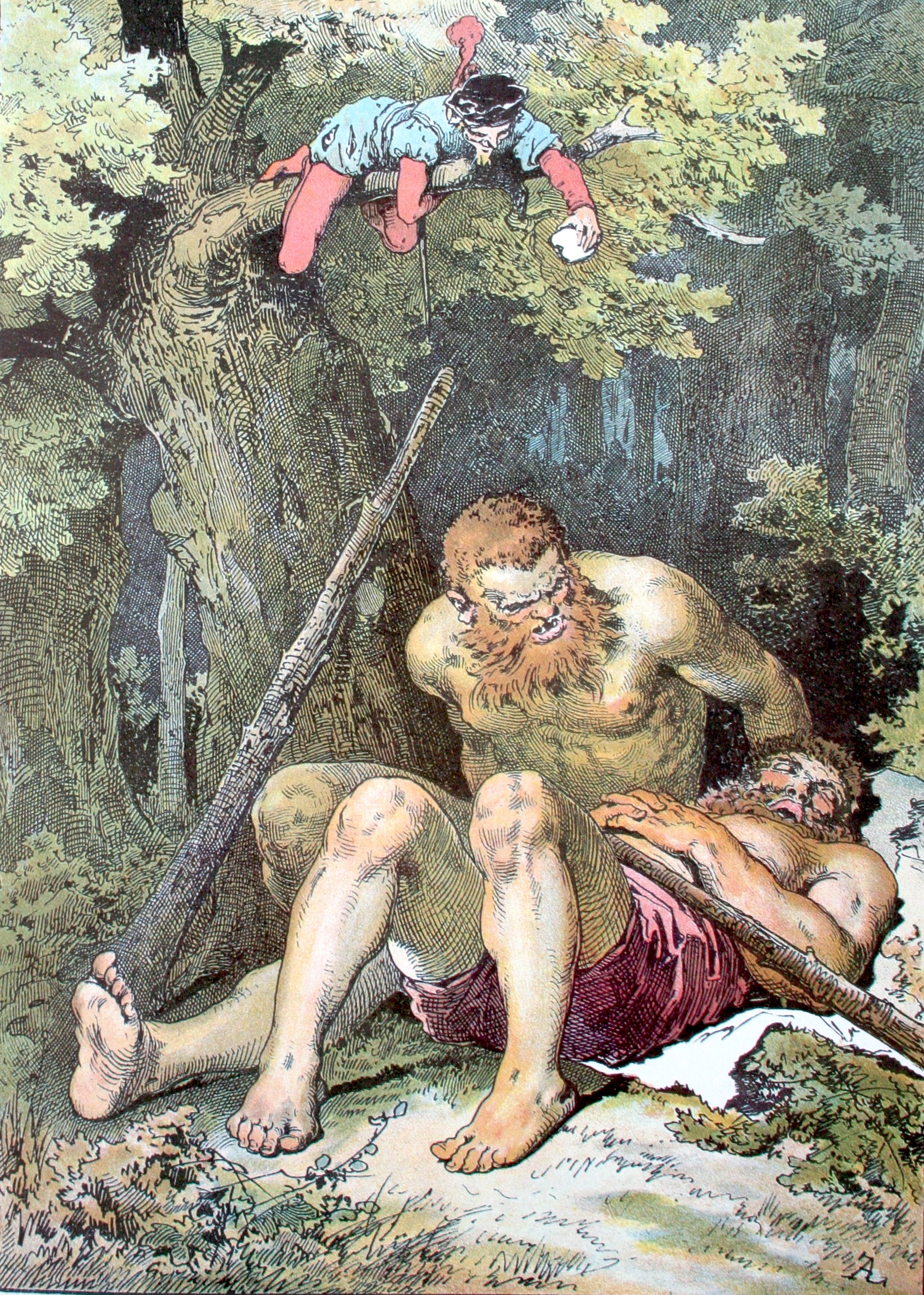 Das tapfere Schneiderlein; Darstellung von Alexander Zick (1845 - 1907)